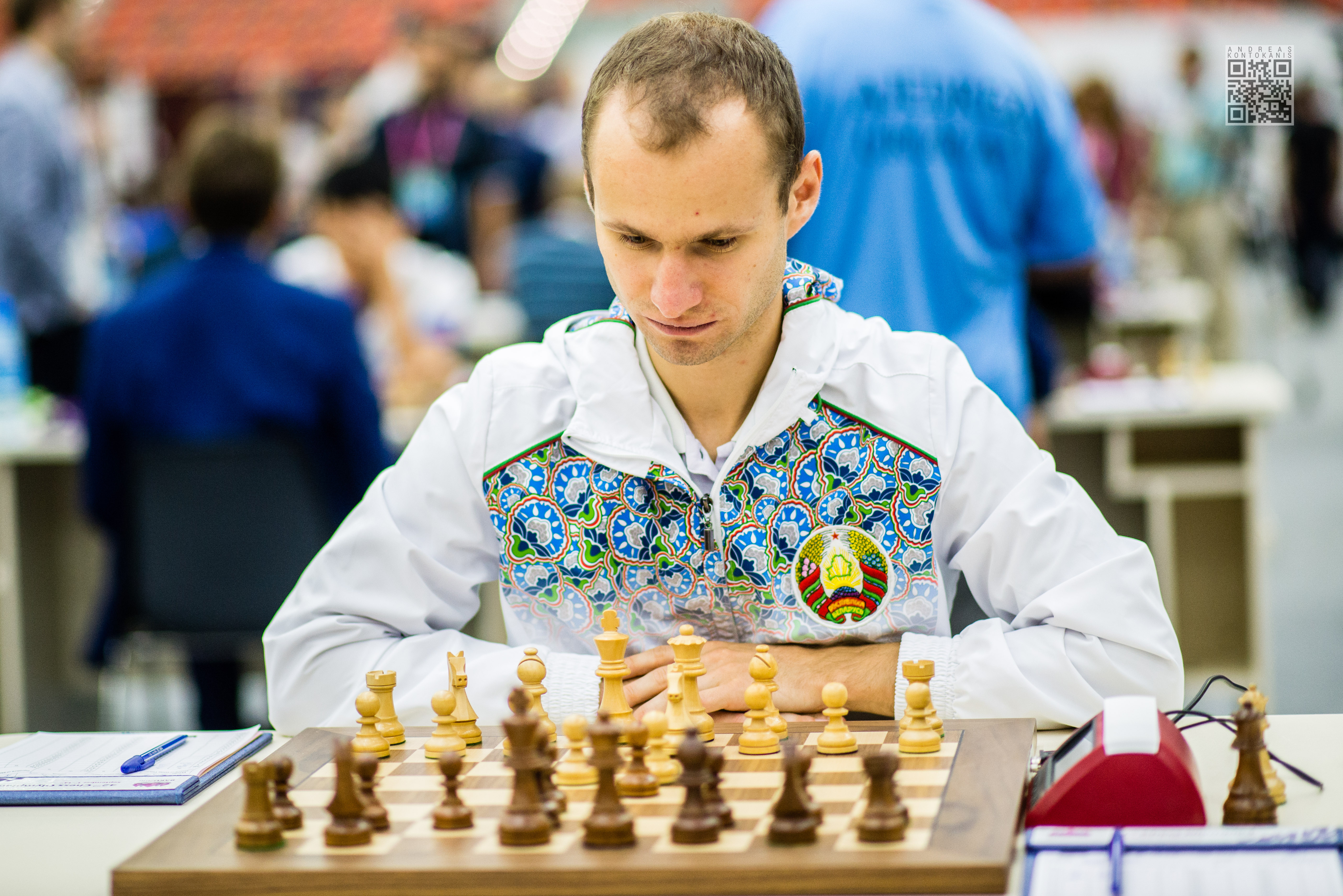 Sergei Zhigalko